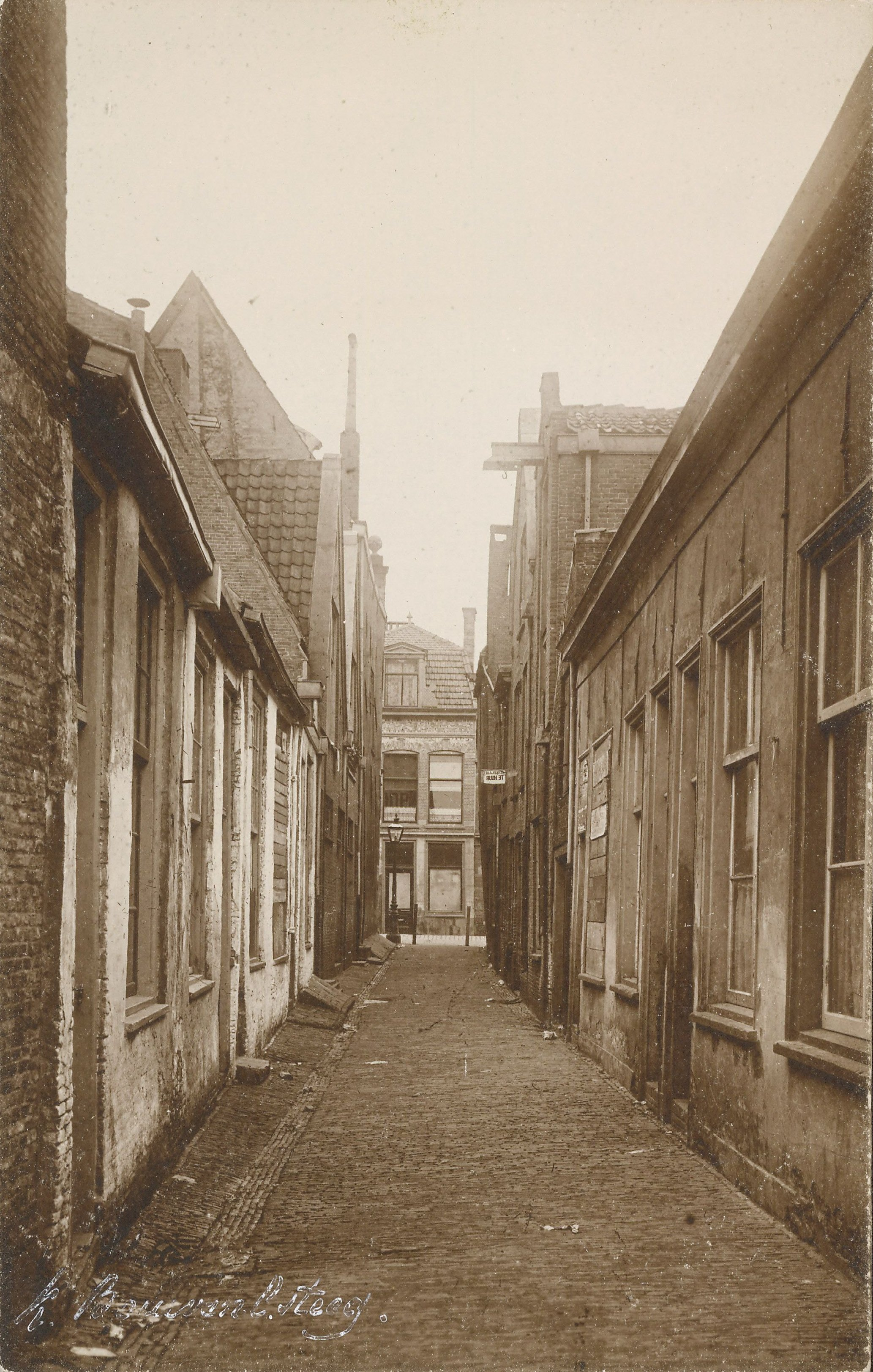 Gezien van de Van der Werfstraat naar de Haarlemmerstraat.